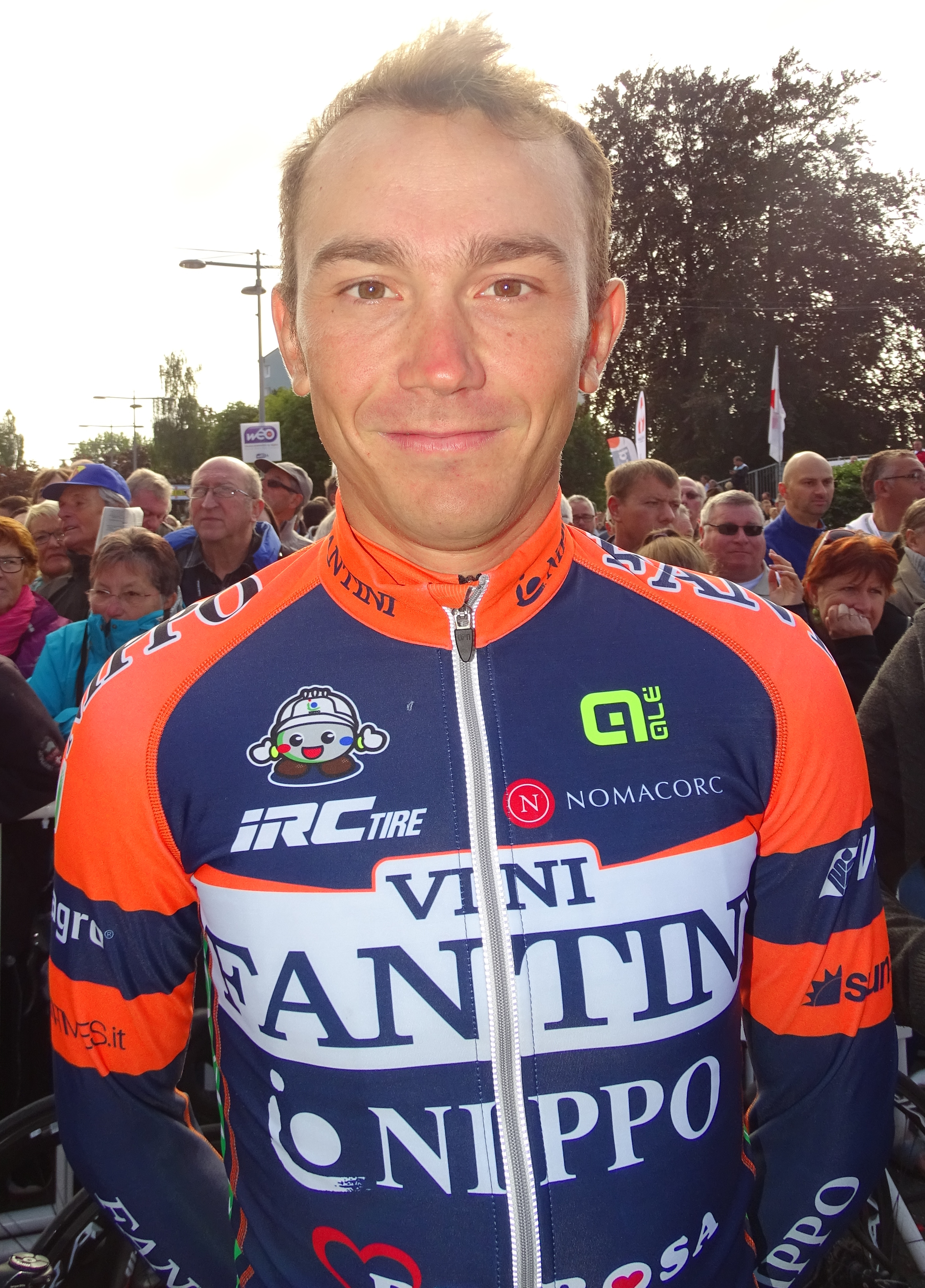 Reportage réalisé le dimanche 6 septembre à l'occasion du départ et de l'arrivée du Grand Prix de Fourmies 2015 à Fourmies, Nord-Pas-de-Calais, France.